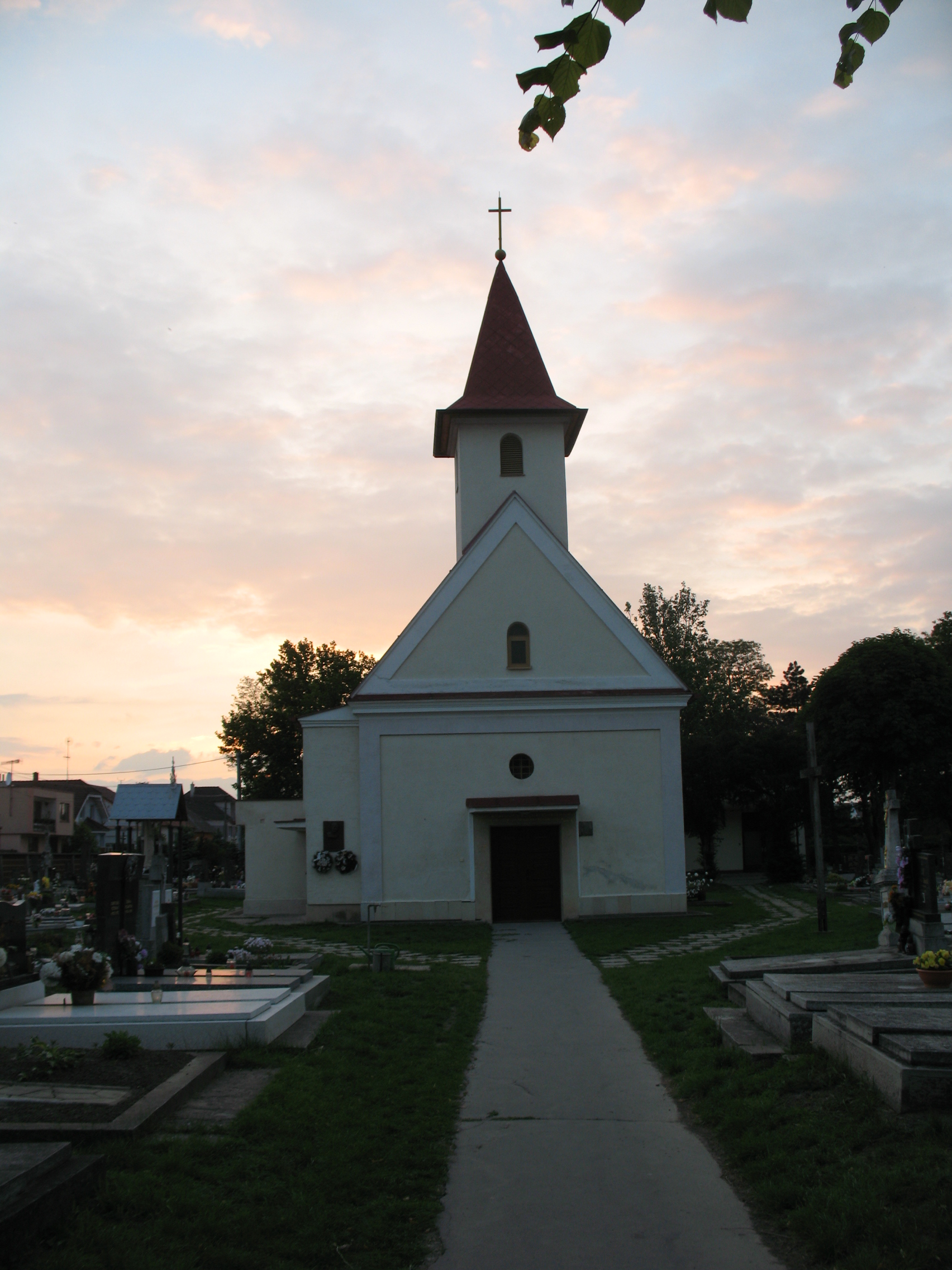 Apaj Opoj